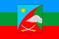 Прапор Гайсинського району